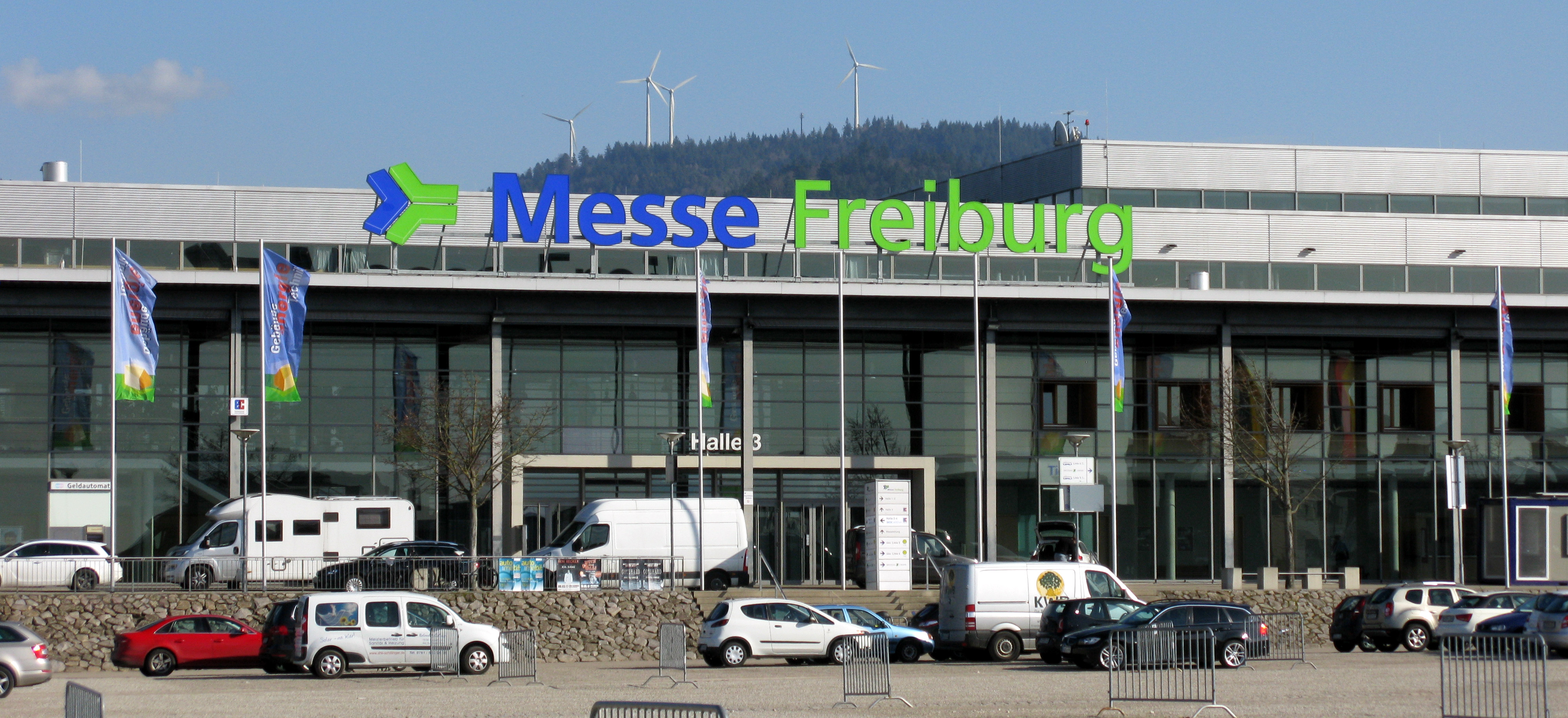 Messe Freiburg mit Rosskopf